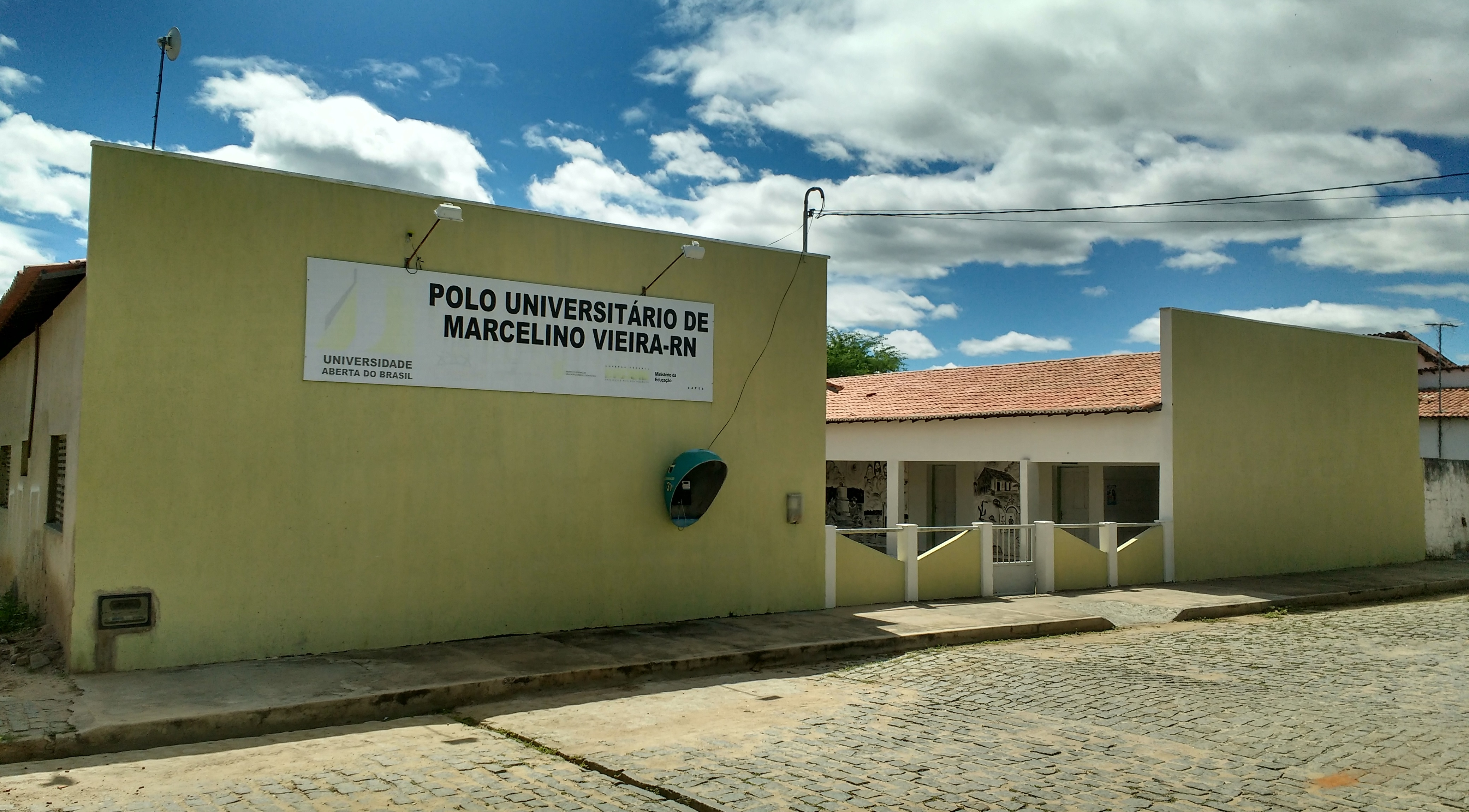 Polo da Universidade Aberta do Brasil em Marcelino Vieira, Rio Grande do Norte (Brasil).